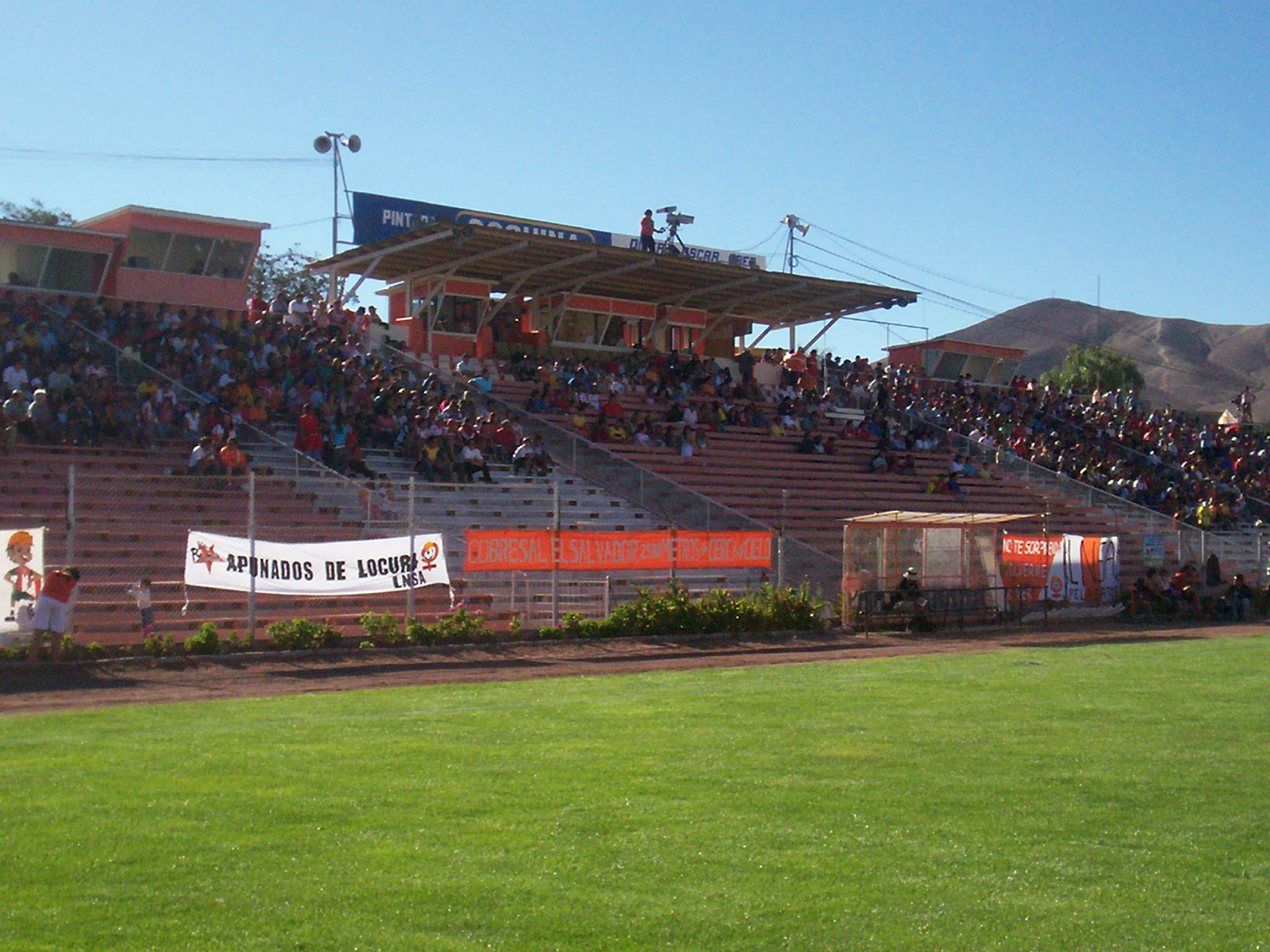 Estadio El Cobre, El Salvador, Chile.